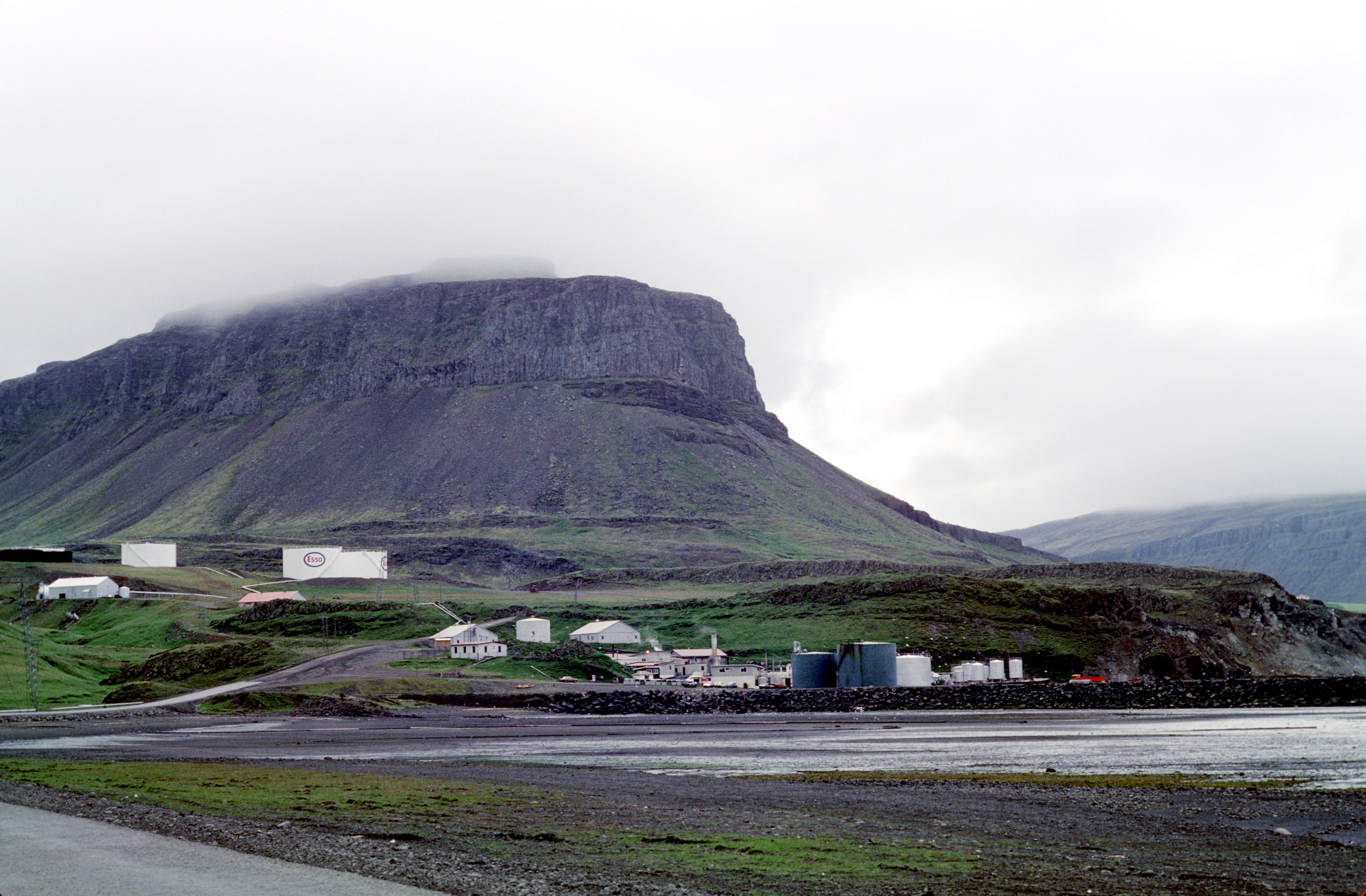 La station baleinière du Hvalfjörður photographiée depuis le Hvalfjarðarvegur (Chemin du Fjord des Baleines, route n° 47). Elle est située presqu' au fond du Hvalfjörður (Fjord des Baleines), entre Miðsandur et la presqu' île de þyrilsnes. Au delà de la station baleinière, on aperçoit des réservoirs de carburant Esso. La montagne qui domine l' ensemble est la Múlafjall (la Montagne des Mules). Sur le carte topographique islandaise feuillet 36, la station baleinière du Hvalfjörður est simplement appelée hvalstöð (port baleinier). Hvalfjörður, Ouest Islande/Région de la Capitale, Islande.